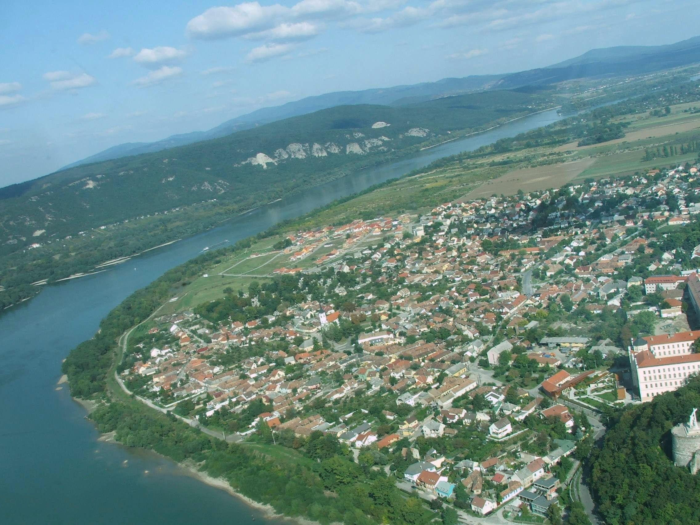 Szentgyörgymező szemben a Kovácspataki-hegyek, jobb szélen a Helemba-sziget